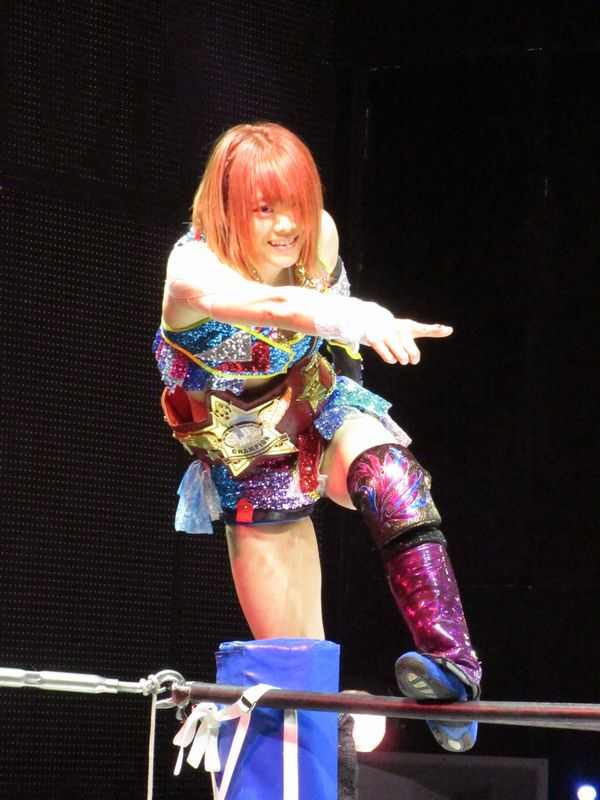 2019年大阪大会にて